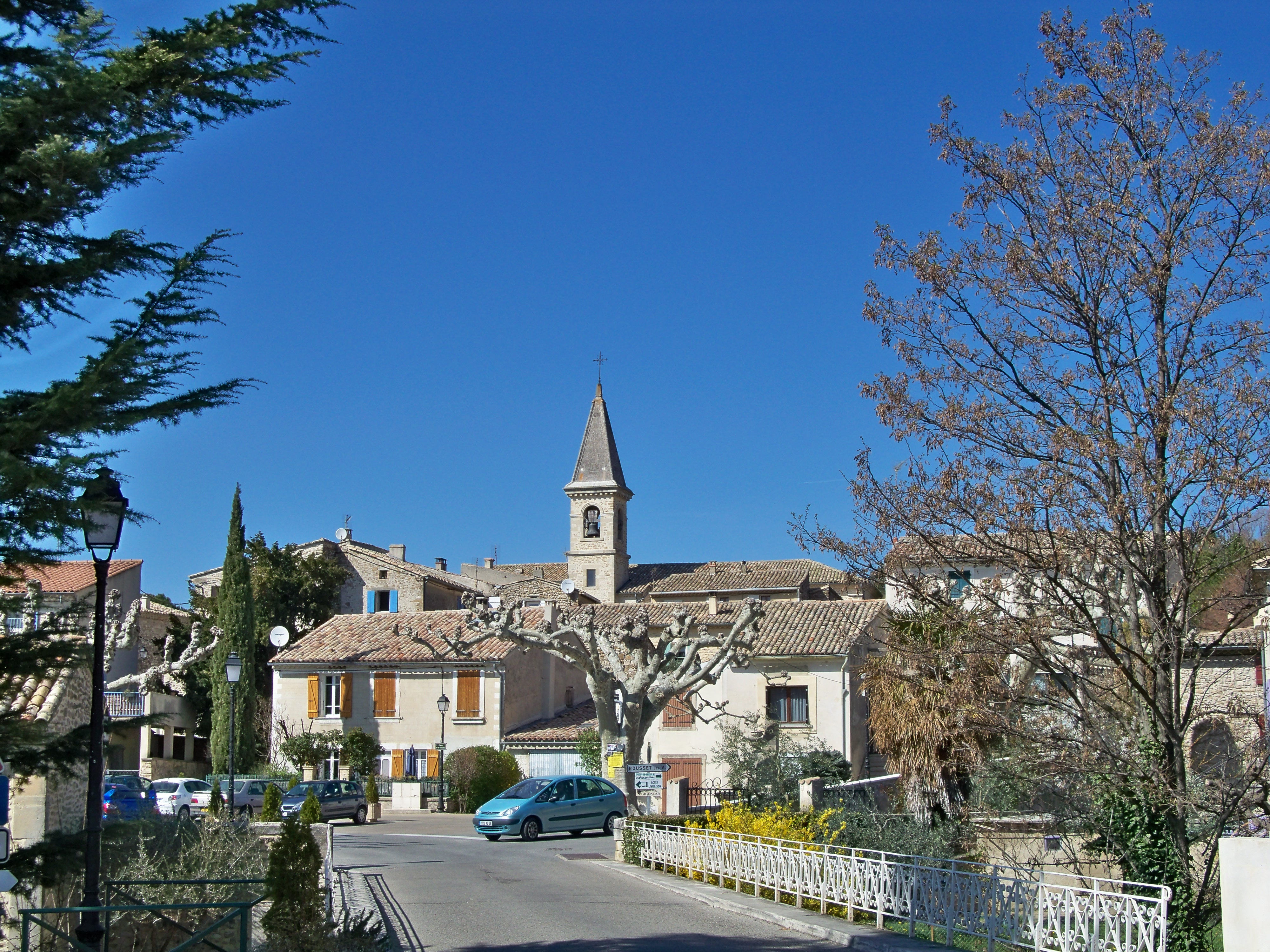 village de Saint Pantaléon les Vignes (26)